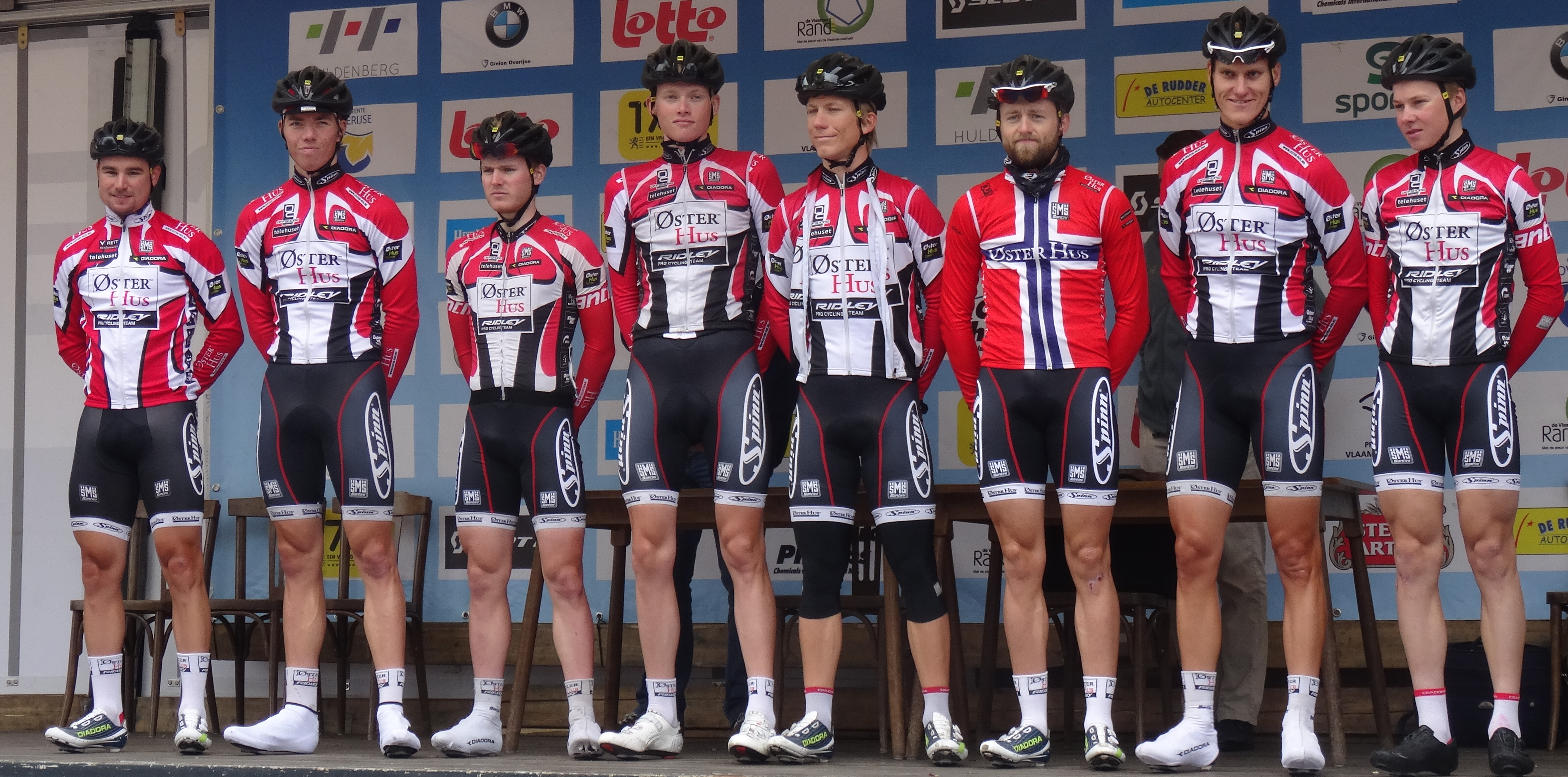 Reportage photographique réalisé le mercredi 27 août à l'occasion du départ de la Druivenkoers Overijse 2014 à Huldenberg, Belgique.